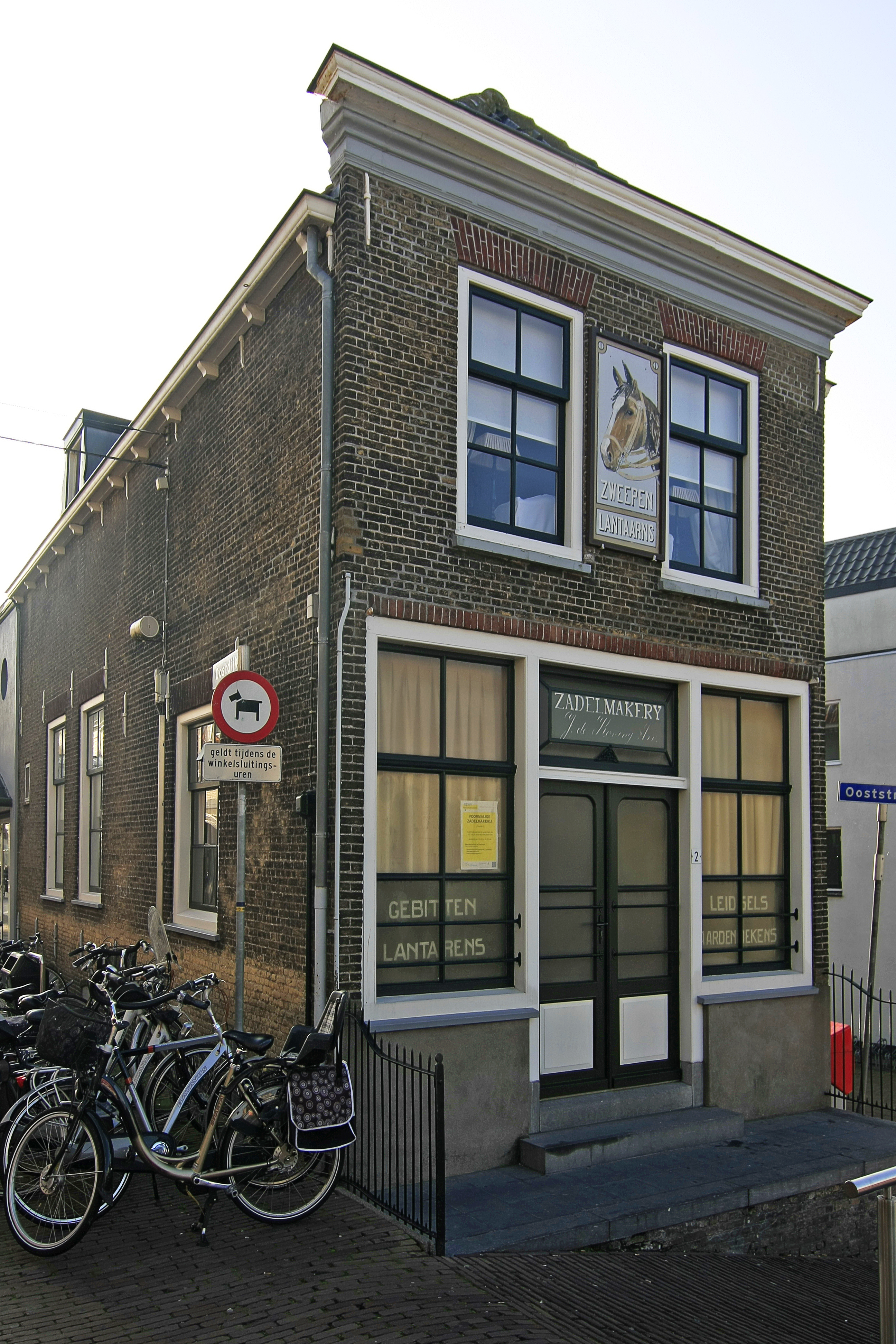 Historisch pand. Oude locatie van Koni.